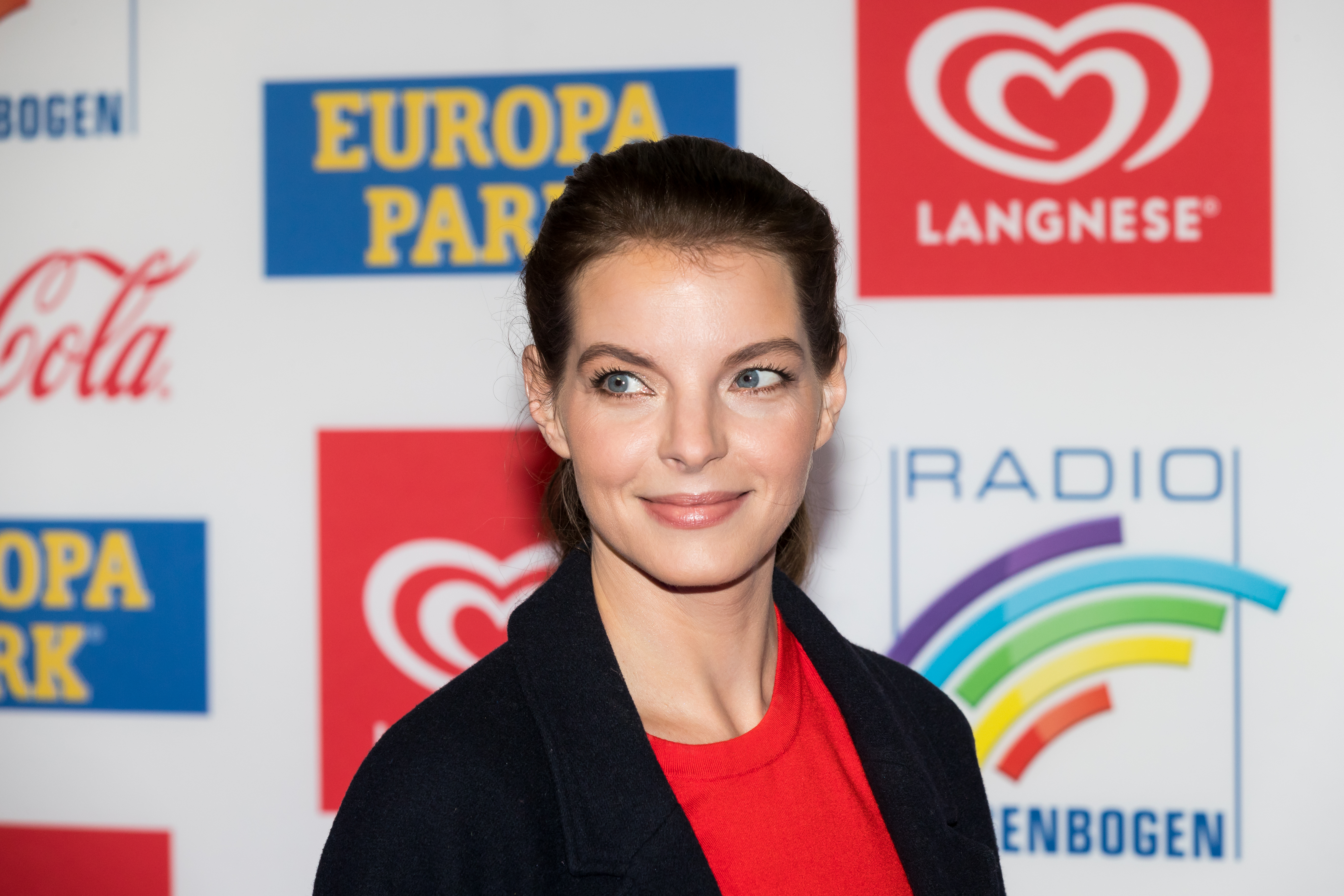 during Radio Regenbogen Award 2018 at Europapark, Rust, Baden-Württemberg, Germany on 2018-03-23, Photo: Sven Mandel